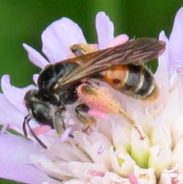 Hymenoptera, Andrenidae, Andrena hattorfiana femelle sur Knautia arvensis